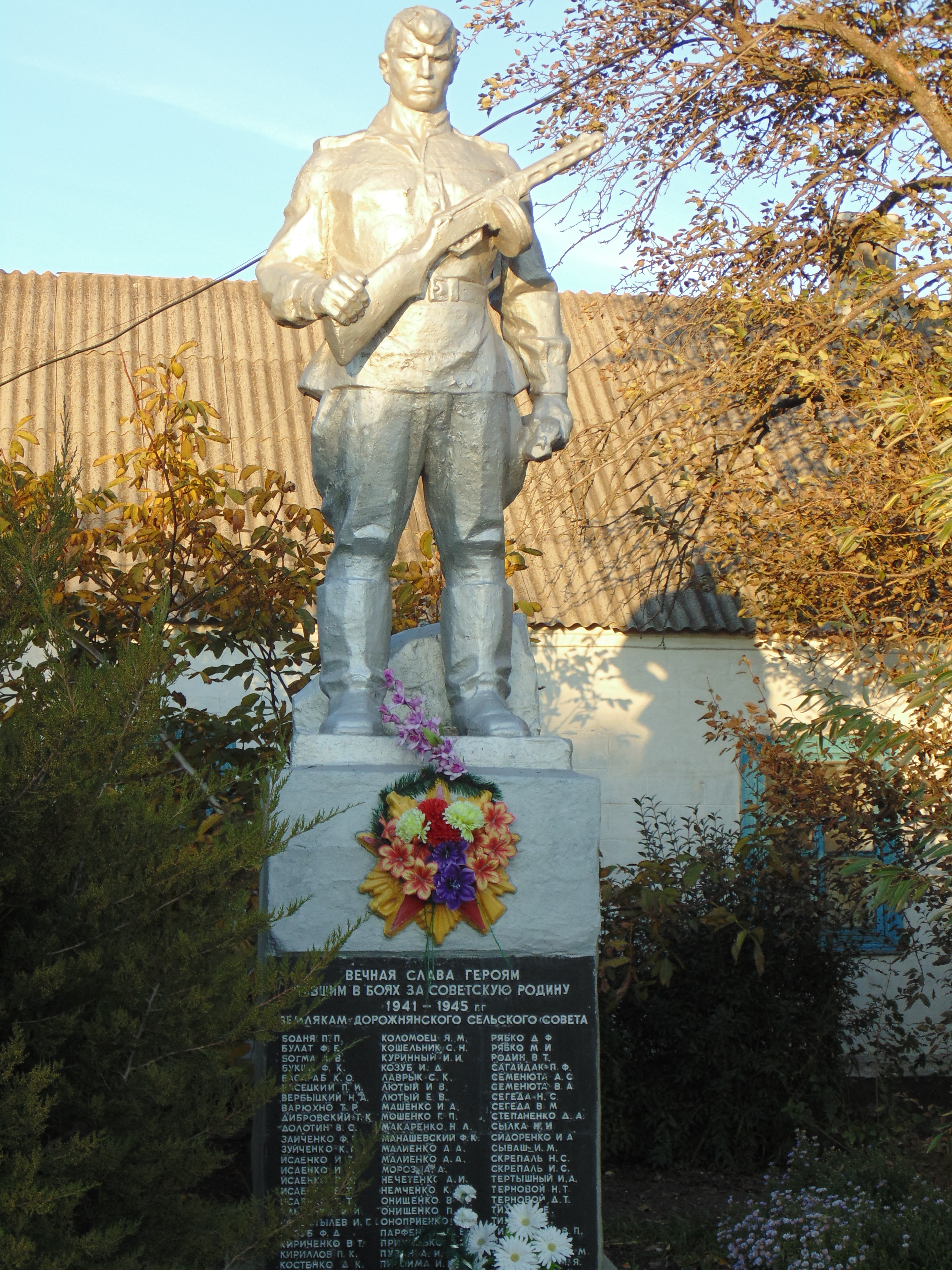 Пам'ятник воїнам - односельцям, с. Дорожнянка, в центрі села